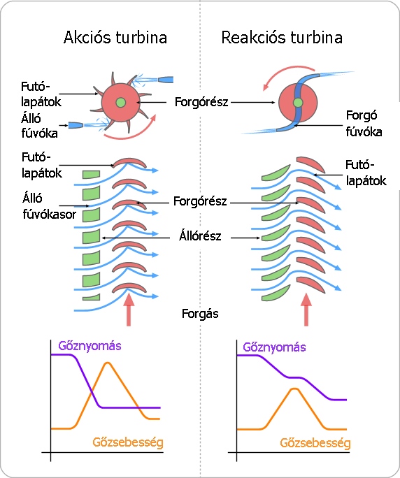 Akciós-reakciós gőzturbina összehasonlítása